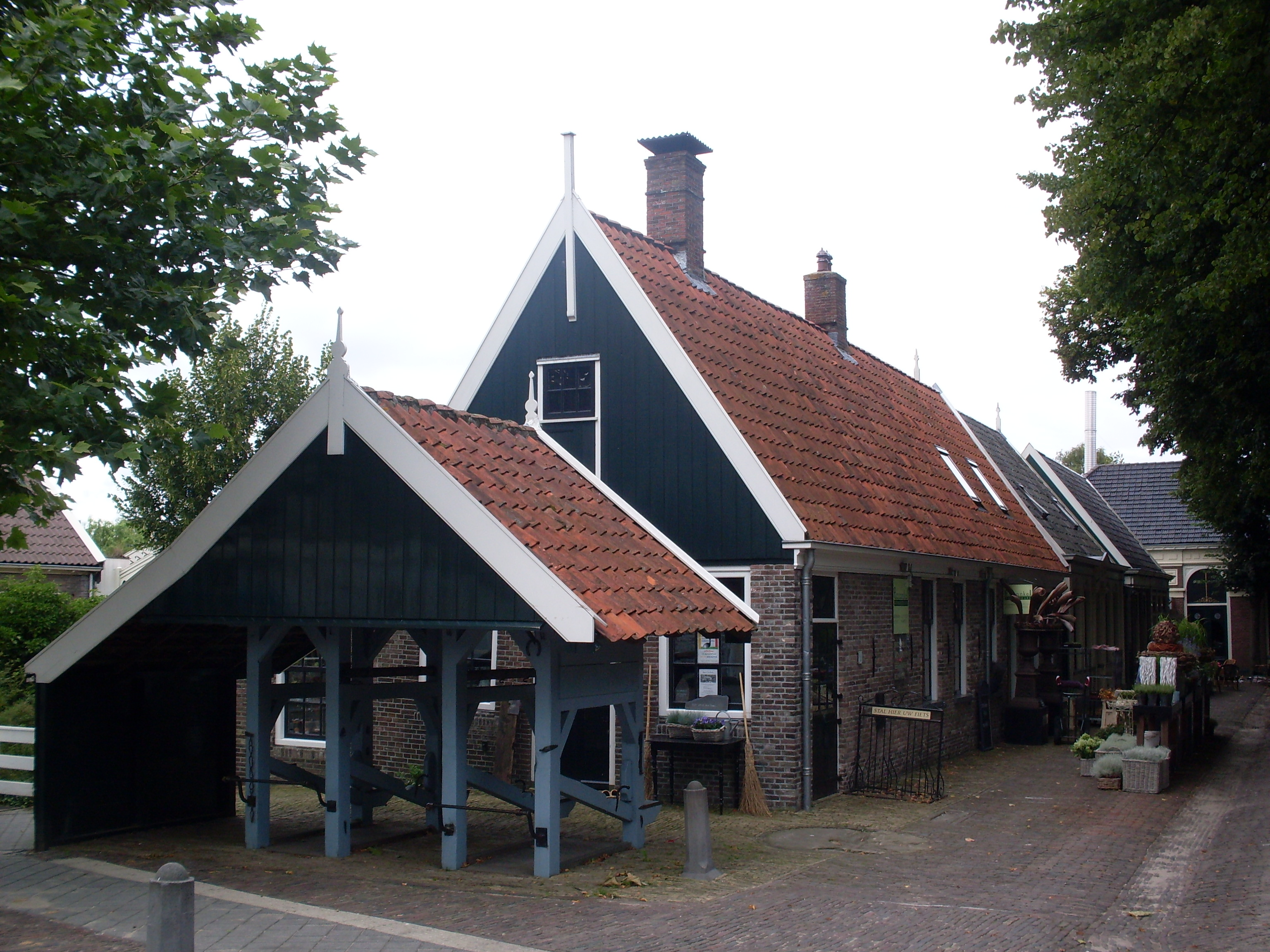 Travalje Middenbeemster.